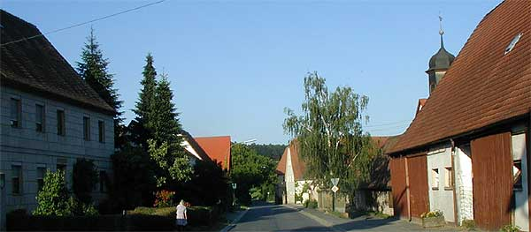 Abtsgreuth